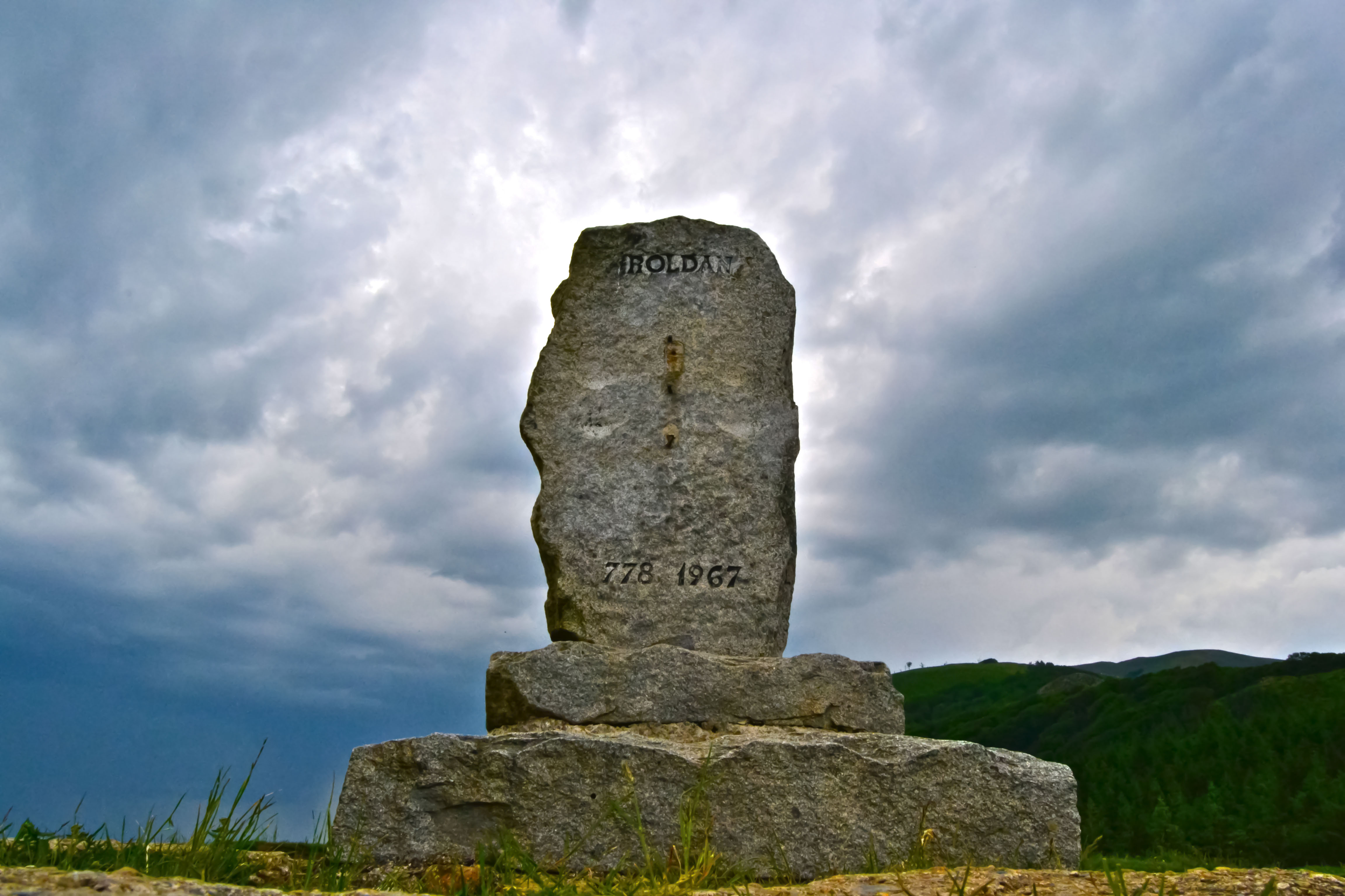 Ibañeta mendateko oroitarria. Orreaga. Nafarroa, Euskal Herria. (Euskara) Monument at the Ibañeta pass. Orreaga-Roncesvalles. Navarre, Basque Country. (English)